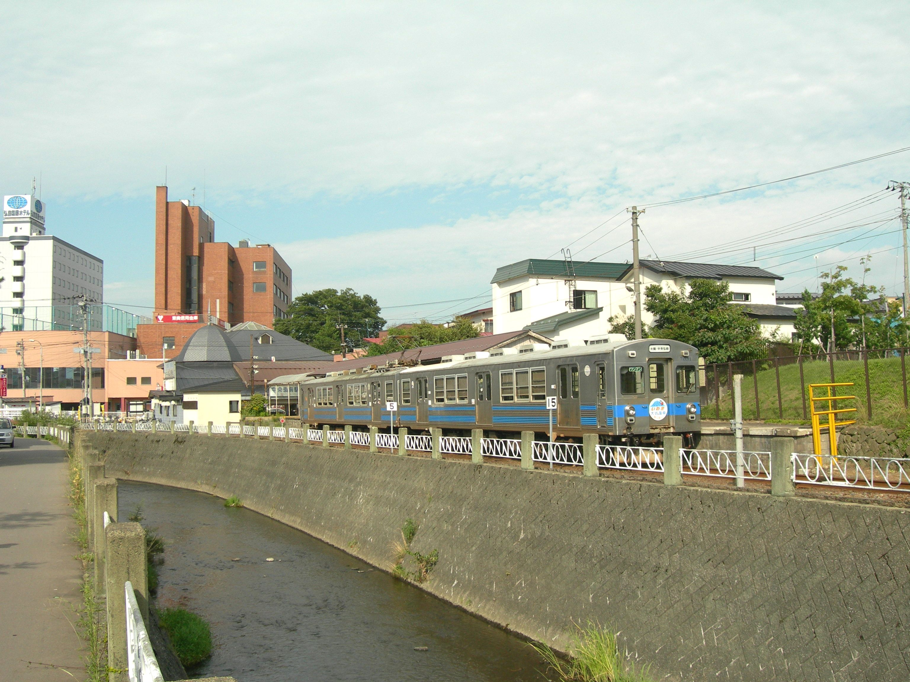 弘南鉄道中央弘前駅 遠景